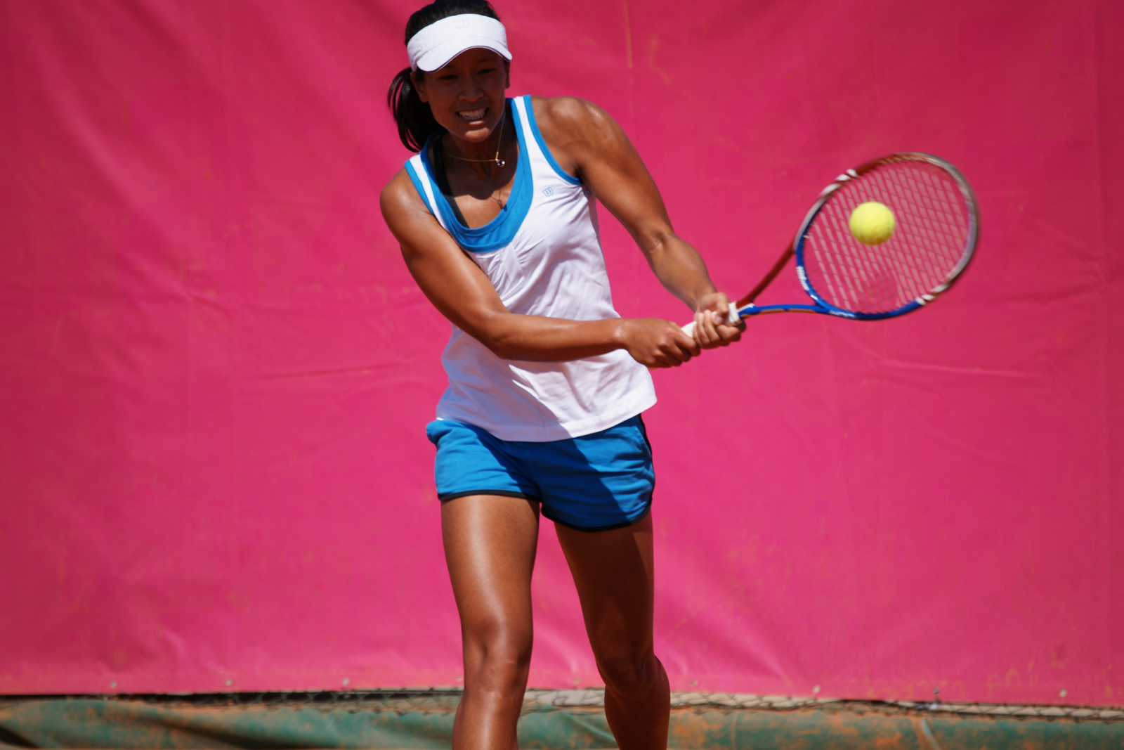 Anne KEOTHAVONG, Open Tennis Cagnes-sur-Mer, 2011